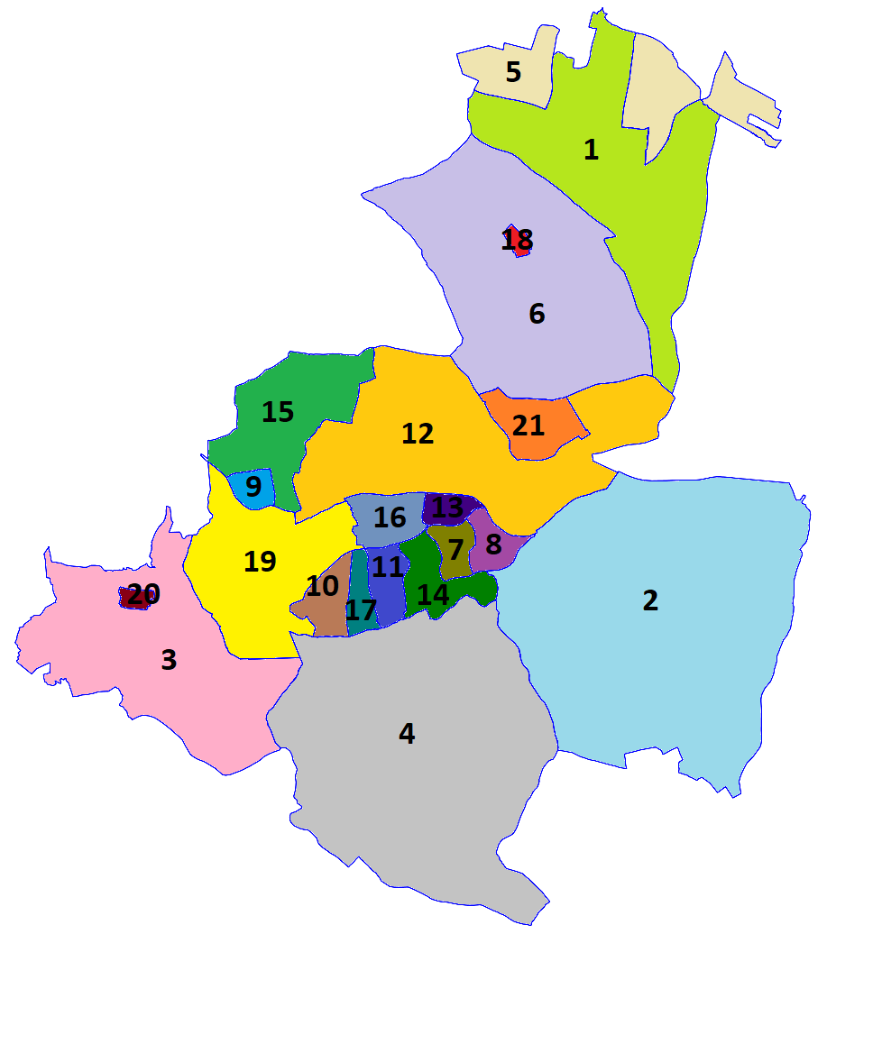 Podział administracyjny miasta Jastrzębie-Zdrój na jednostki pomocnicze - osiedla i sołectwa. 1. Sołectwo Borynia; 2. Sołectwo Bzie; 3. Sołectwo Moszczenica; 4. Sołectwo Ruptawa i Cisówka; 5. Sołectwo Skrzeczkowice; 6. Sołectwo Szeroka; 7. Osiedle Arki Bożka; 8. Osiedle Barbary; 9. Osiele Bogoczowiec; 10. Osiedle Chrobrego; 11. Osiedle Gwarków; 12. Osiedle Jastrzębie Górne i Dolne; 13. Osiedle Morcinka; 14. Osiedle Pionierów; 15. Osiedle Przyjaźń; 16. Osiedle Staszica; 17. Osiedle Tuwima; 18. Osiedle 1000-lecia Szeroka; 19. Osiedle Zdrój; 20. Osiedle Złote Łany; 21. Osiedle Zofiówka.